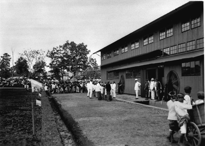 Foto. Zijne Excellentie Gouverneur-Generaal mr. D. Fock tijdens zijn bezoek aan de Tambakan-theefabriek, 27 of 28 oktober 1922, West-Java.